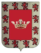 Escudo de Úbeda, en Jaén (España)